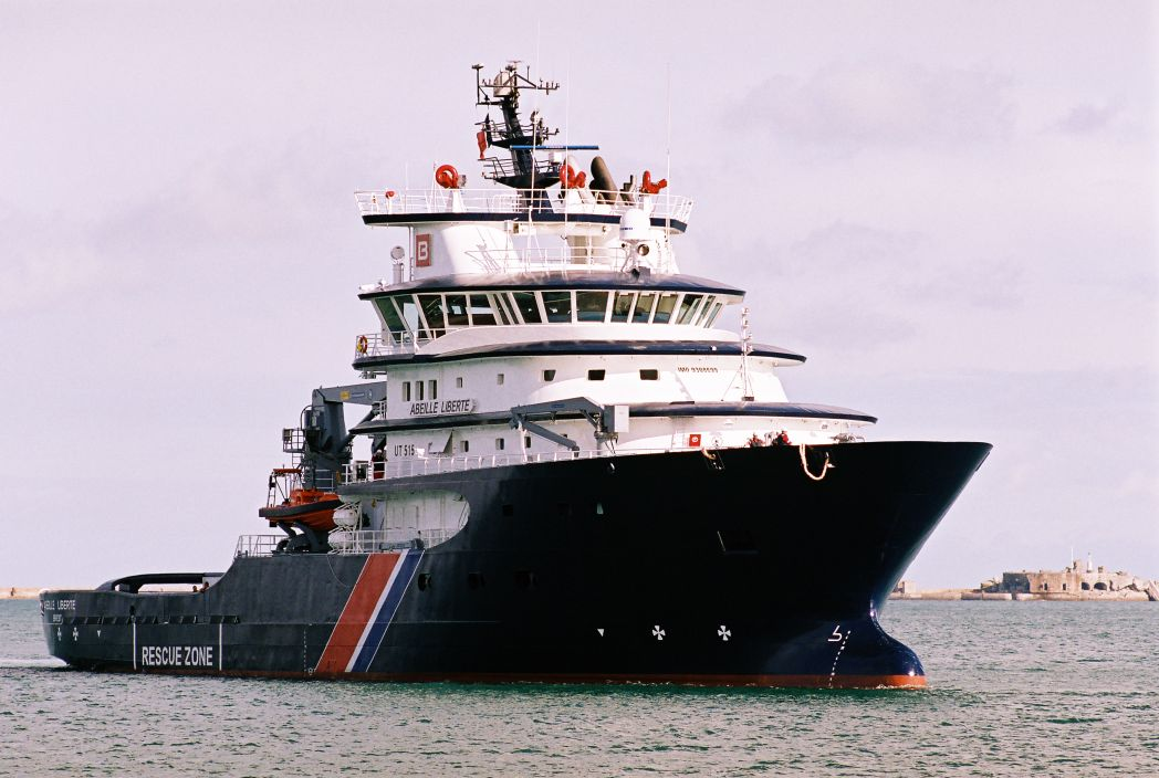 Arrivée de l'Abeille Liberté à Cherbourg. IMO Number: 9308699 MMSI Number: 226265000 Callsign: FMDI Length: 80 m Beam: 17 m